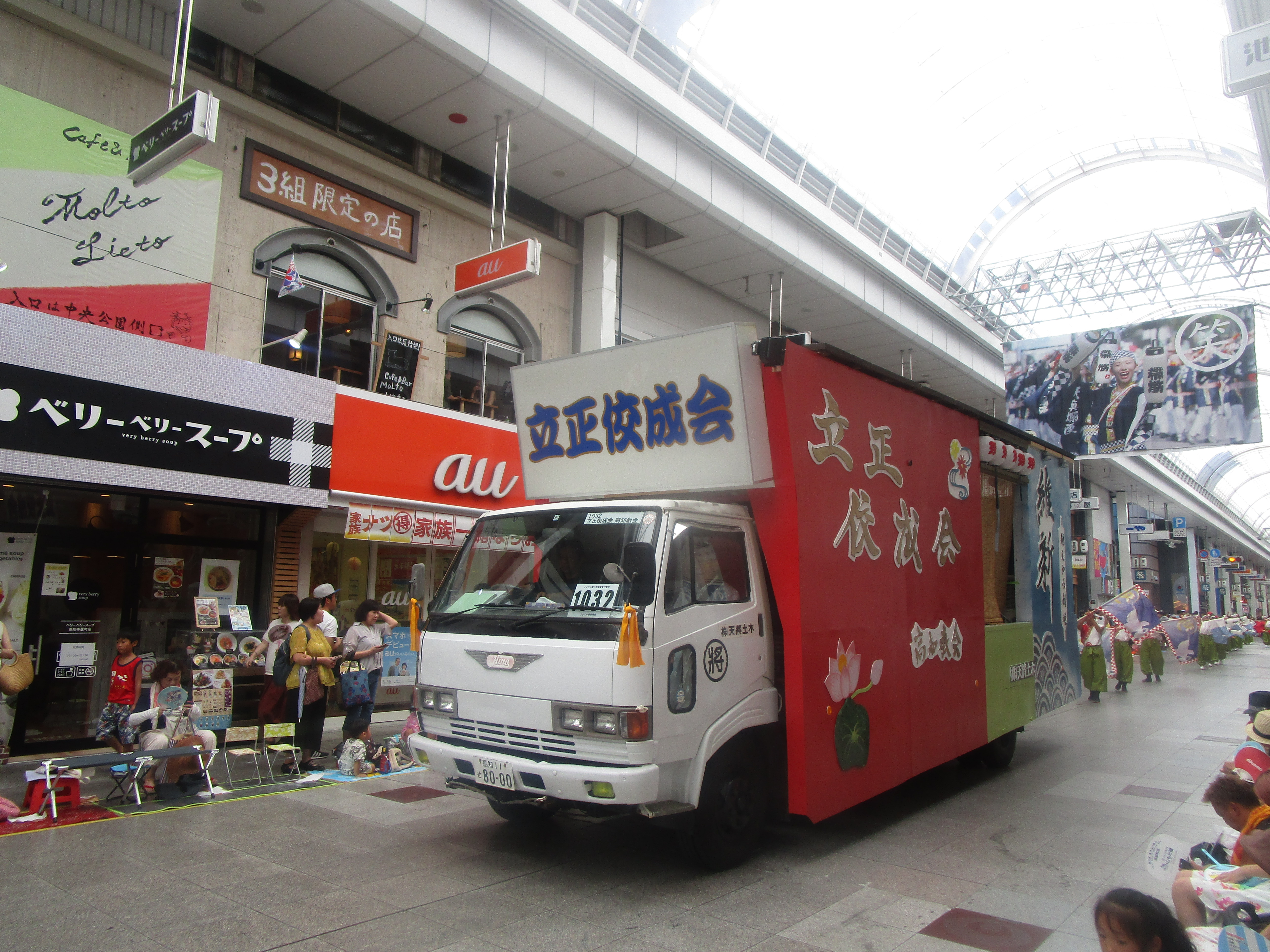 20180810124601_IMG_0082